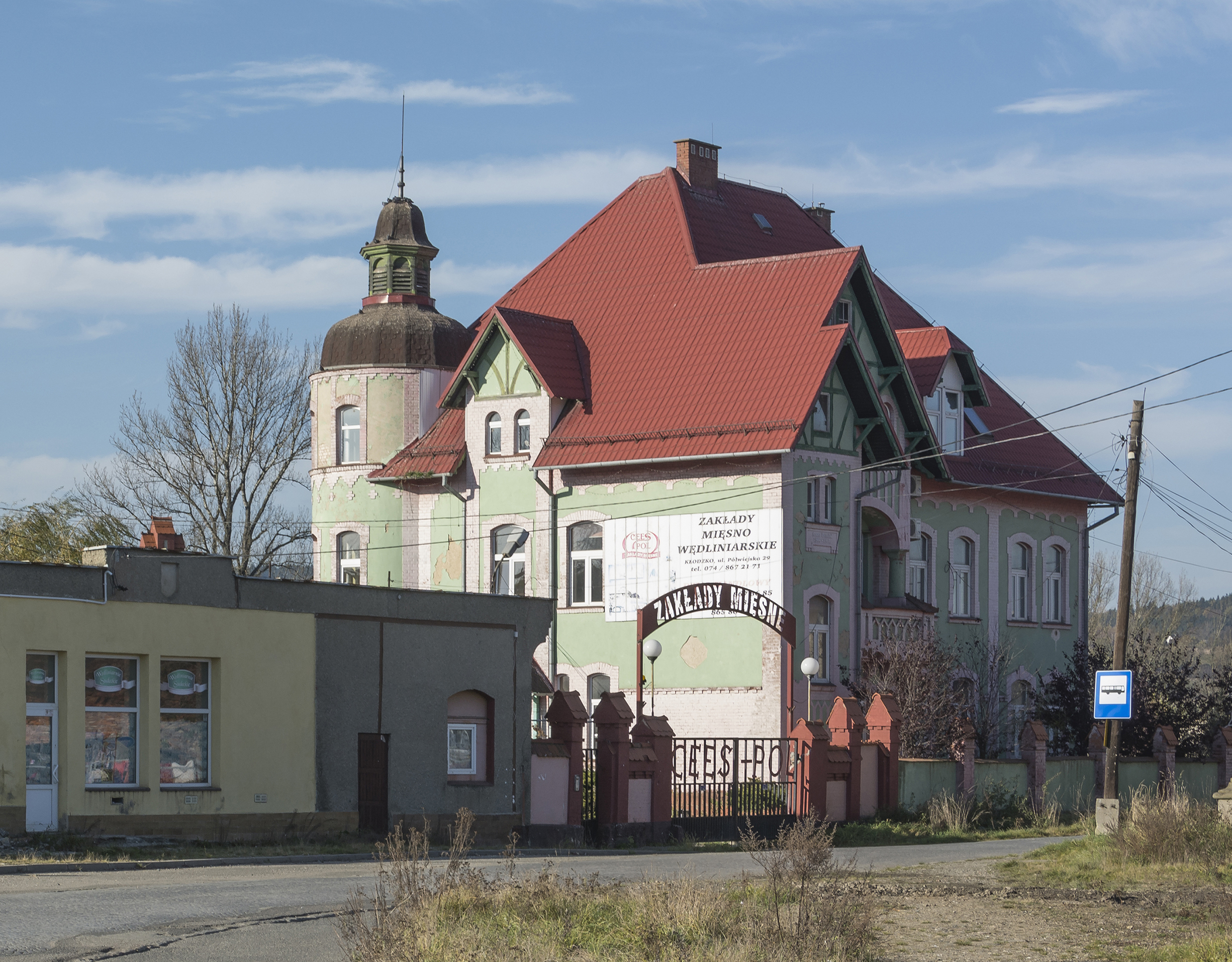 Kłodzko, Cees-Pol